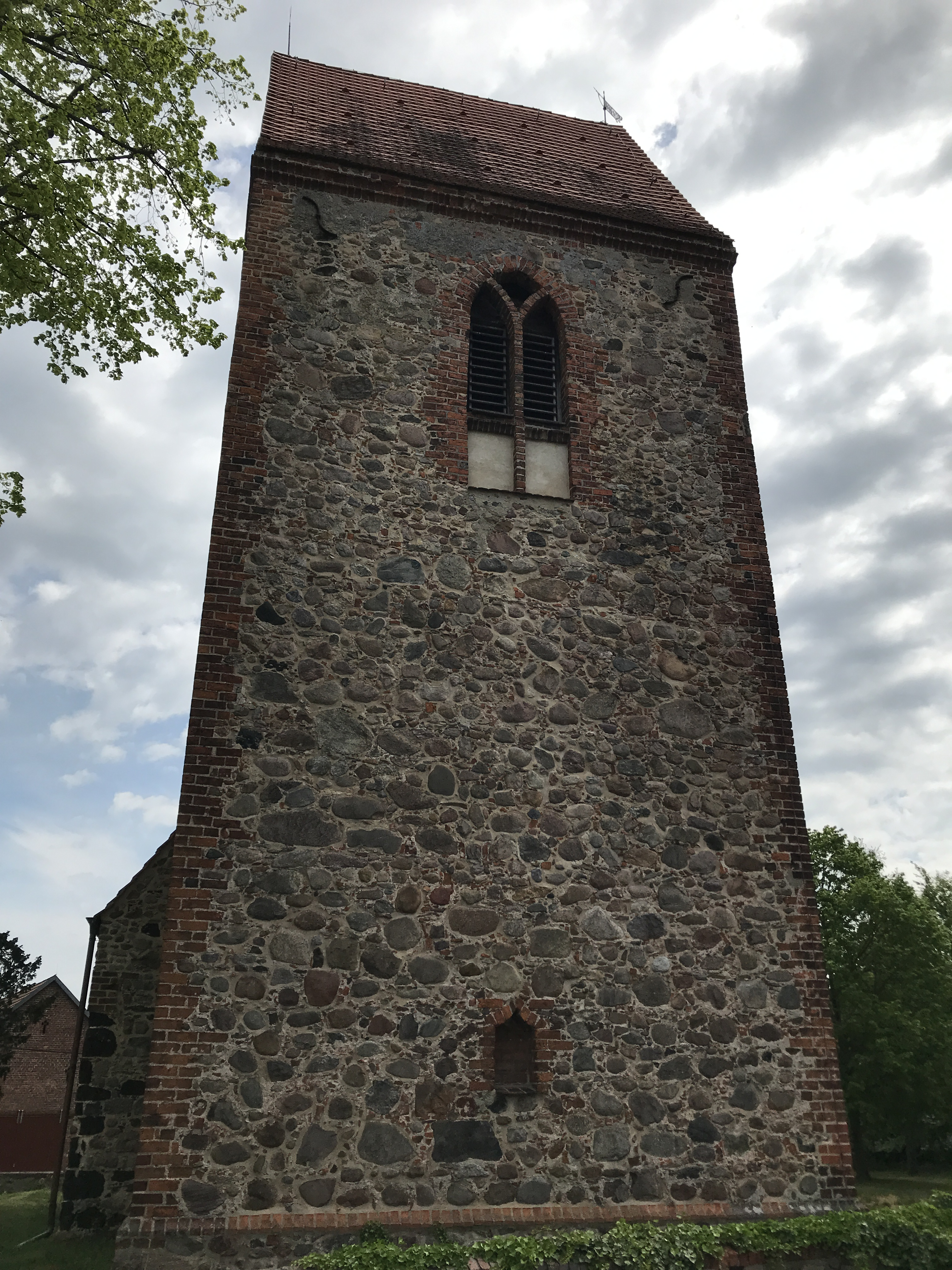 Die Dorfkirche Schlalach in der Gemeinde Mühlenfließ ist eine im Kern spätgotische Feldsteinkirche im Landkreis Potsdam-Mittelmark in Brandenburg. Im Innern steht unter anderem ein Schnitzaltar aus dem dritten Viertel des 15. Jahrhunderts.